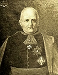 Prälat Johannes Montel (1831-1910), Dekan der Rota